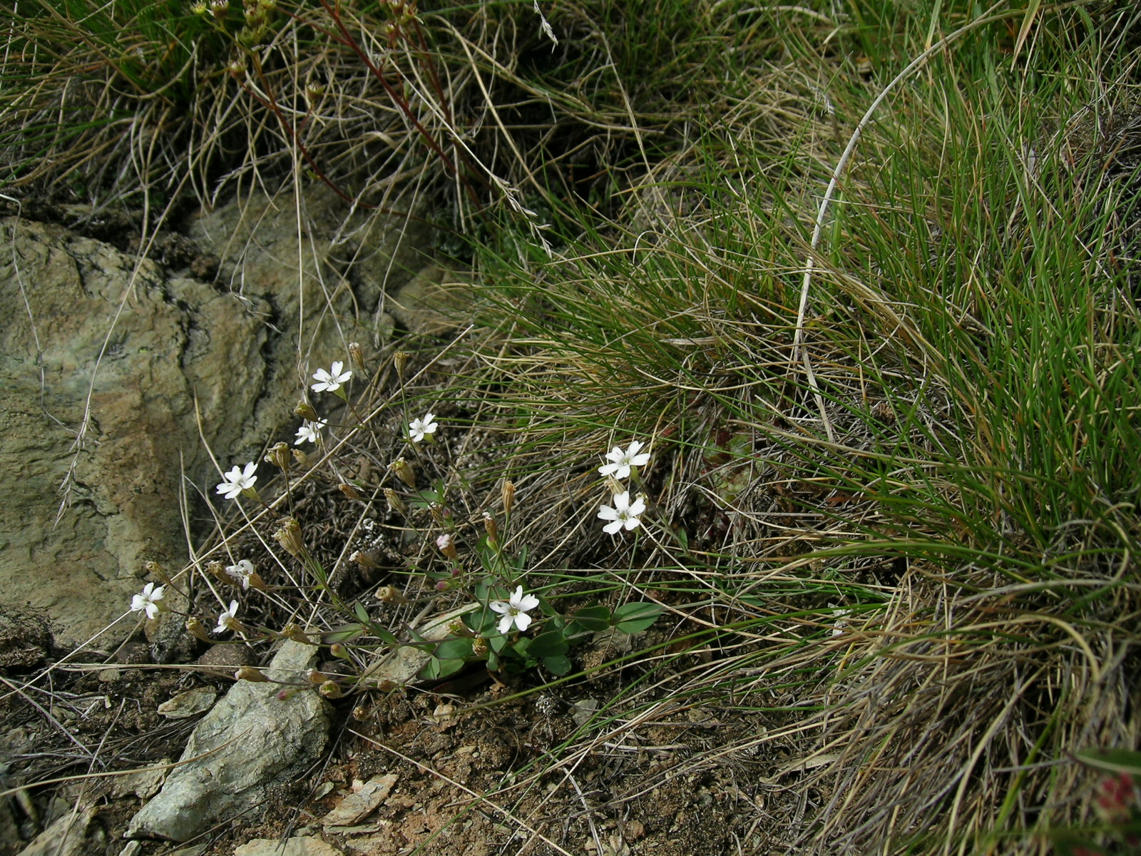 Silene rupestris Zermatt, Riffelberg (Kanton Wallis, Switzerland), 2500 m Author: Roland Teuscher – own photograph Date: 1.08.06